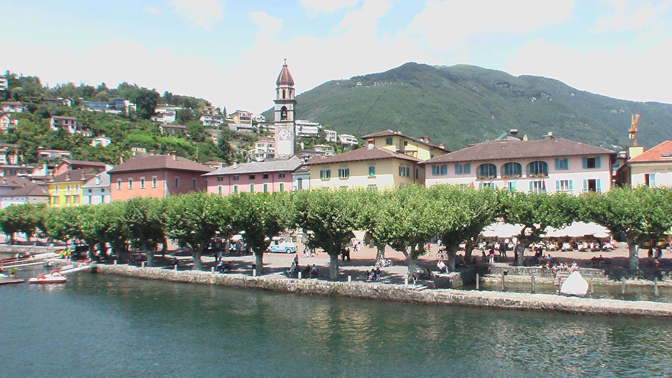 Ascona vom See aus gesehen